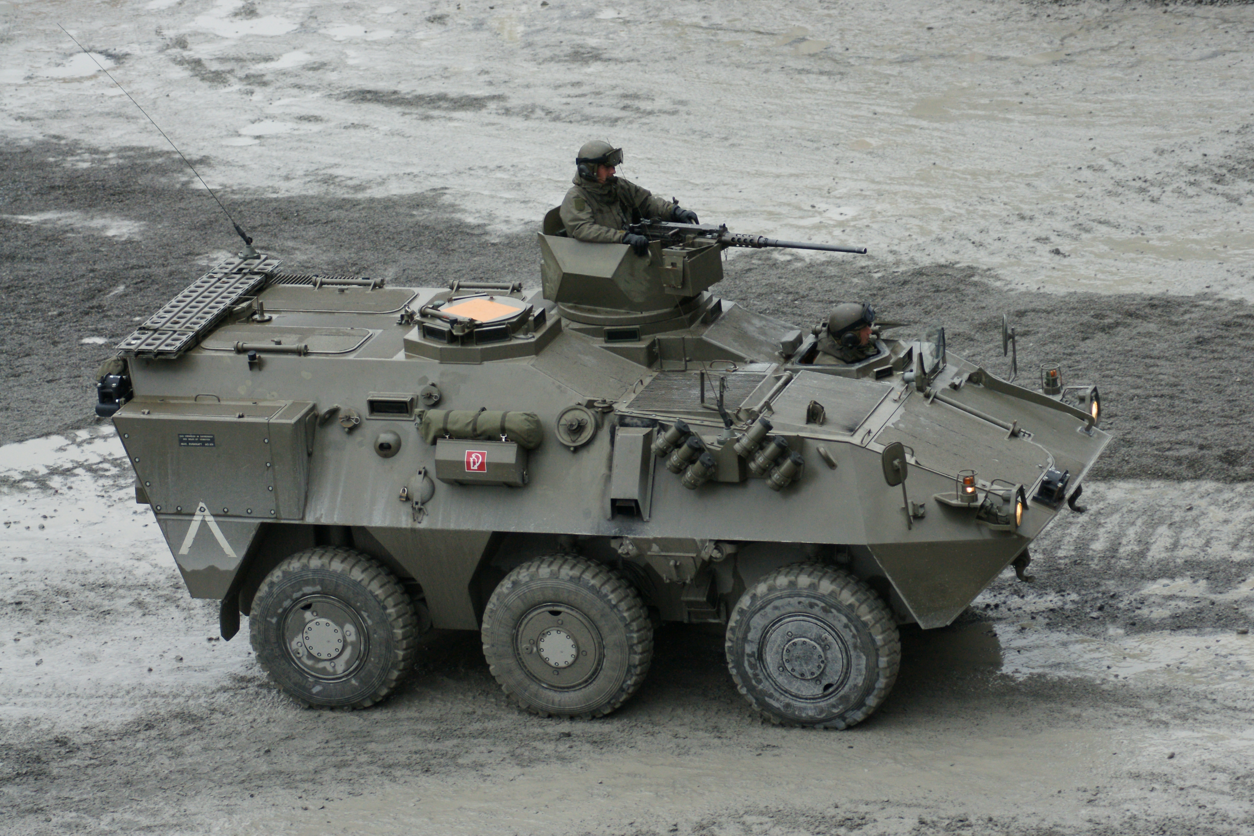 Im Zuge einer Road-Show zeigte das Österreichische Bundesheer im Dornbirner / Hohenemser Steinbruch den Radpanzer Pandur . Kurzbezeichnung: MTPz (Mannschaftstransportpanzer) "Pandur", Gewicht: 13,5 t, Motorleistung: 191 kW (250 PS), Höchstgeschwindigkeit: 100 km/h, Steigfähigkeit: 70 %, Besatzung: 9 Mann, Bewaffnung: 12,7 mm üsMG M2.